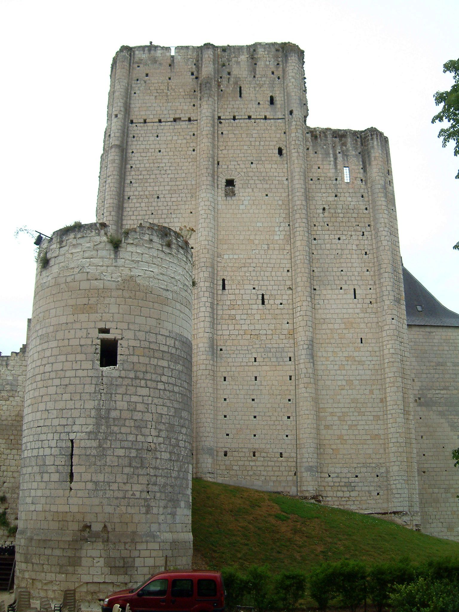 Château de Loches, Loches, FRANCE